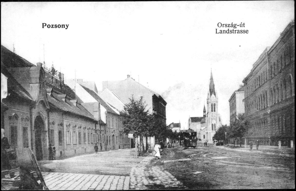 Zeitgenössische Ansichtskarte um 1900